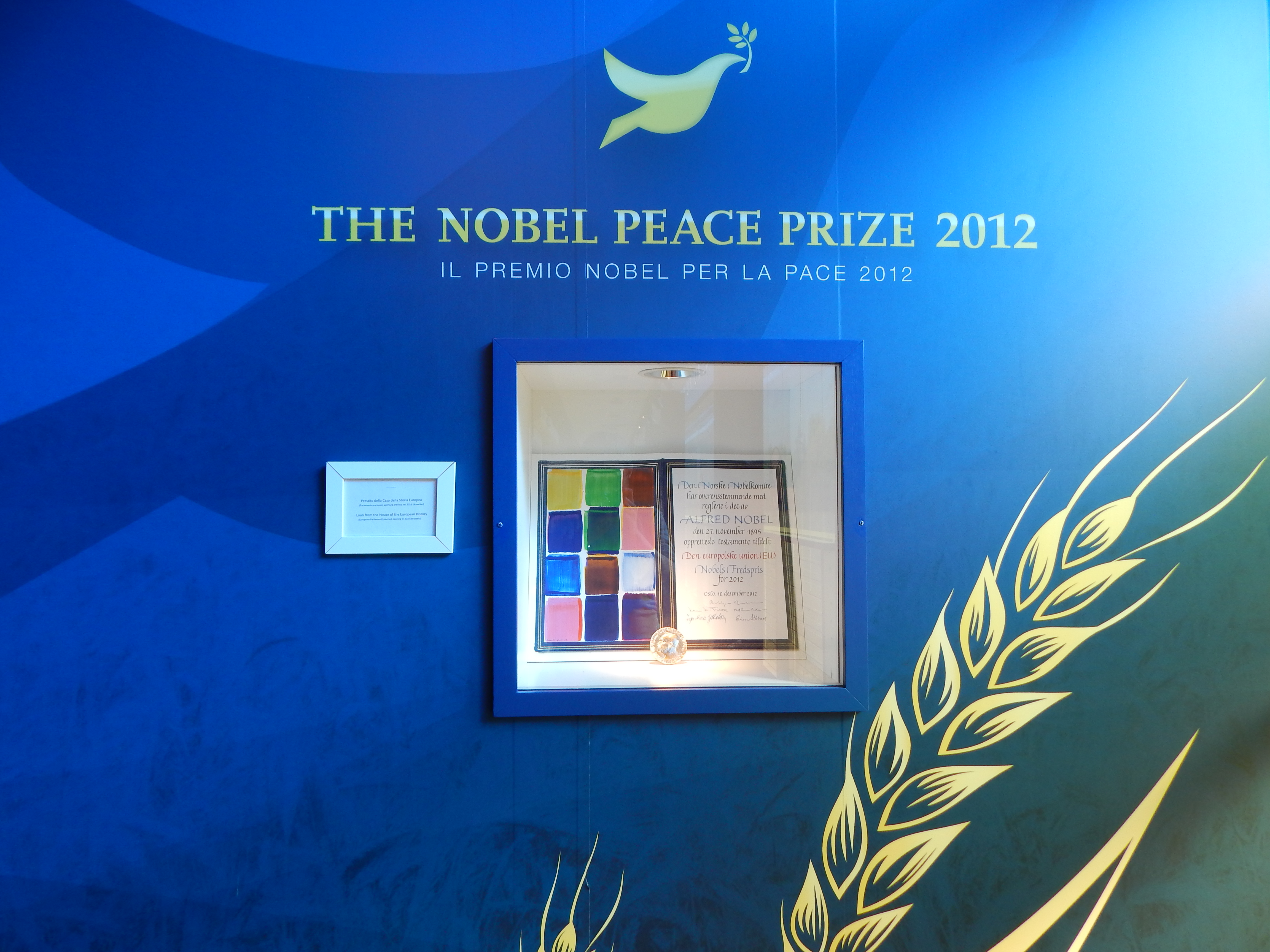 Médaille et citation du prix nobel de la paix 2012, reçu par l'Union européenne pour son rôle en faveur de la paix en Europe et dans le monde. Exposé à l'exposition universelle 2015 dans la ville de Milan en Italie.